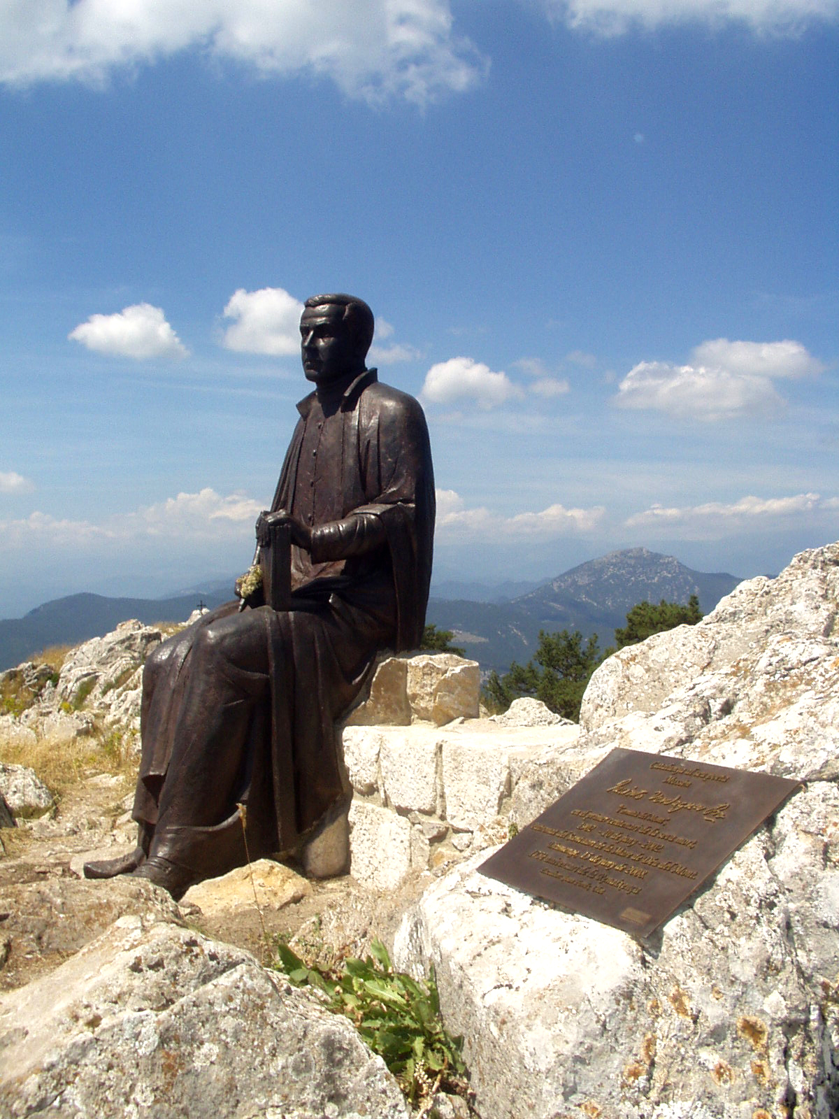 Monument dedicat a Jacinto Verdaguer a la Mare de Déu del Mont (Sculptor:Joan Ferrés i Curós, 2008)